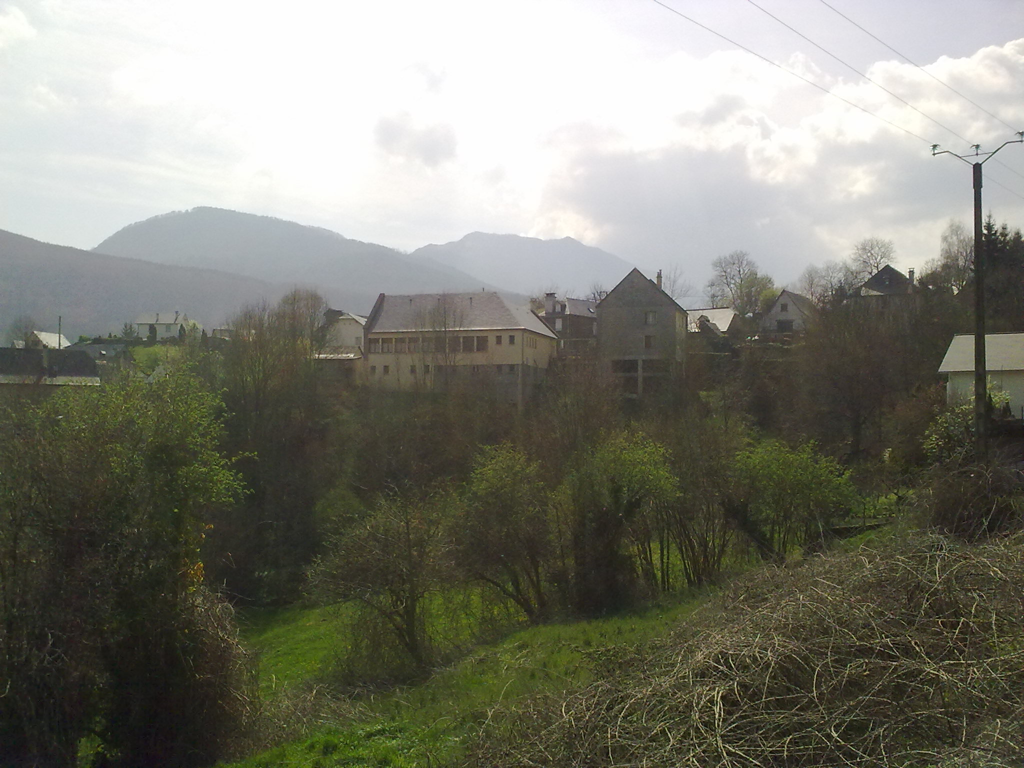 Salles, département 65, France